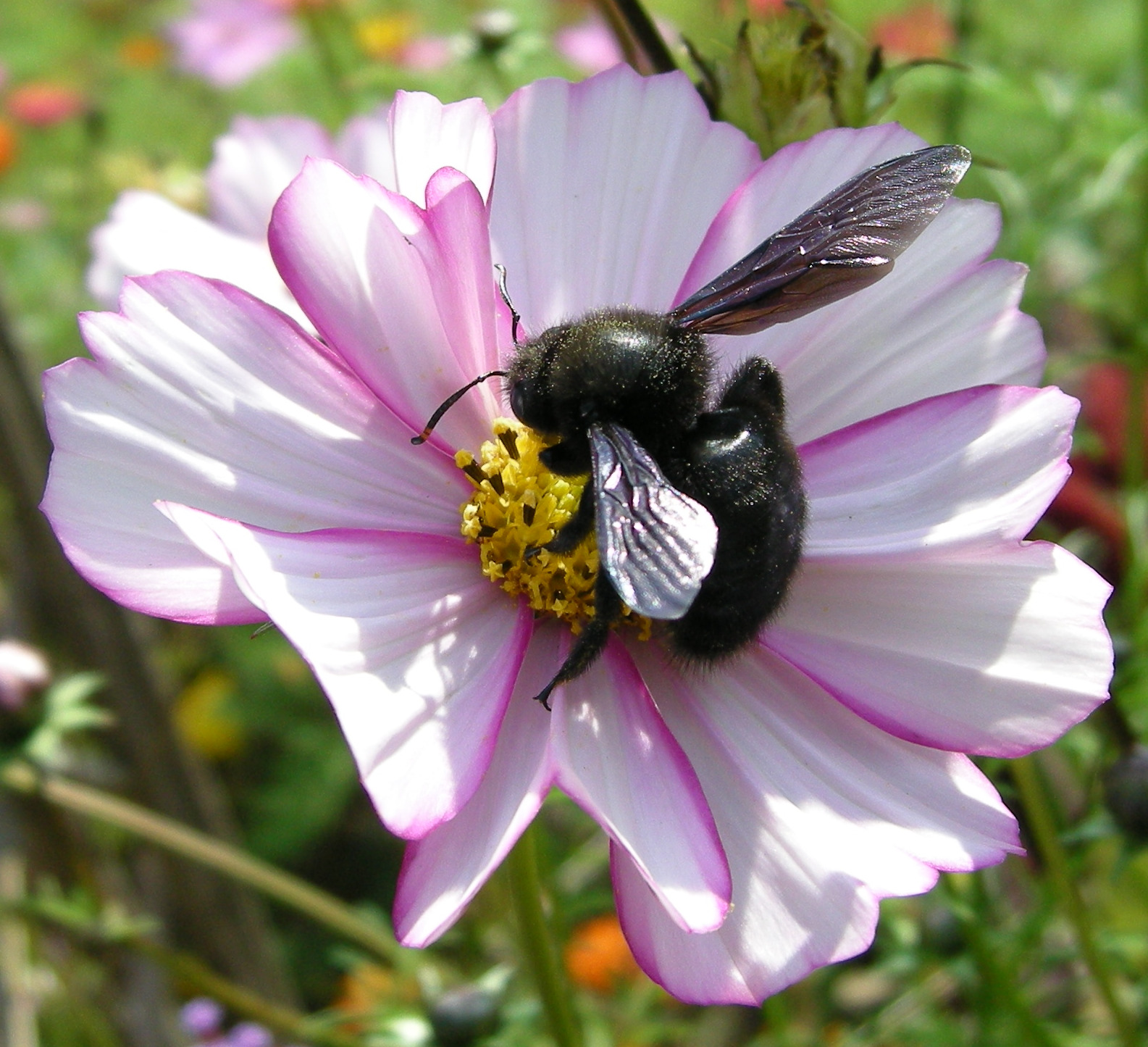 Abeille charpentière, male, dans une fleur de cosmos (Cosmos sp.).